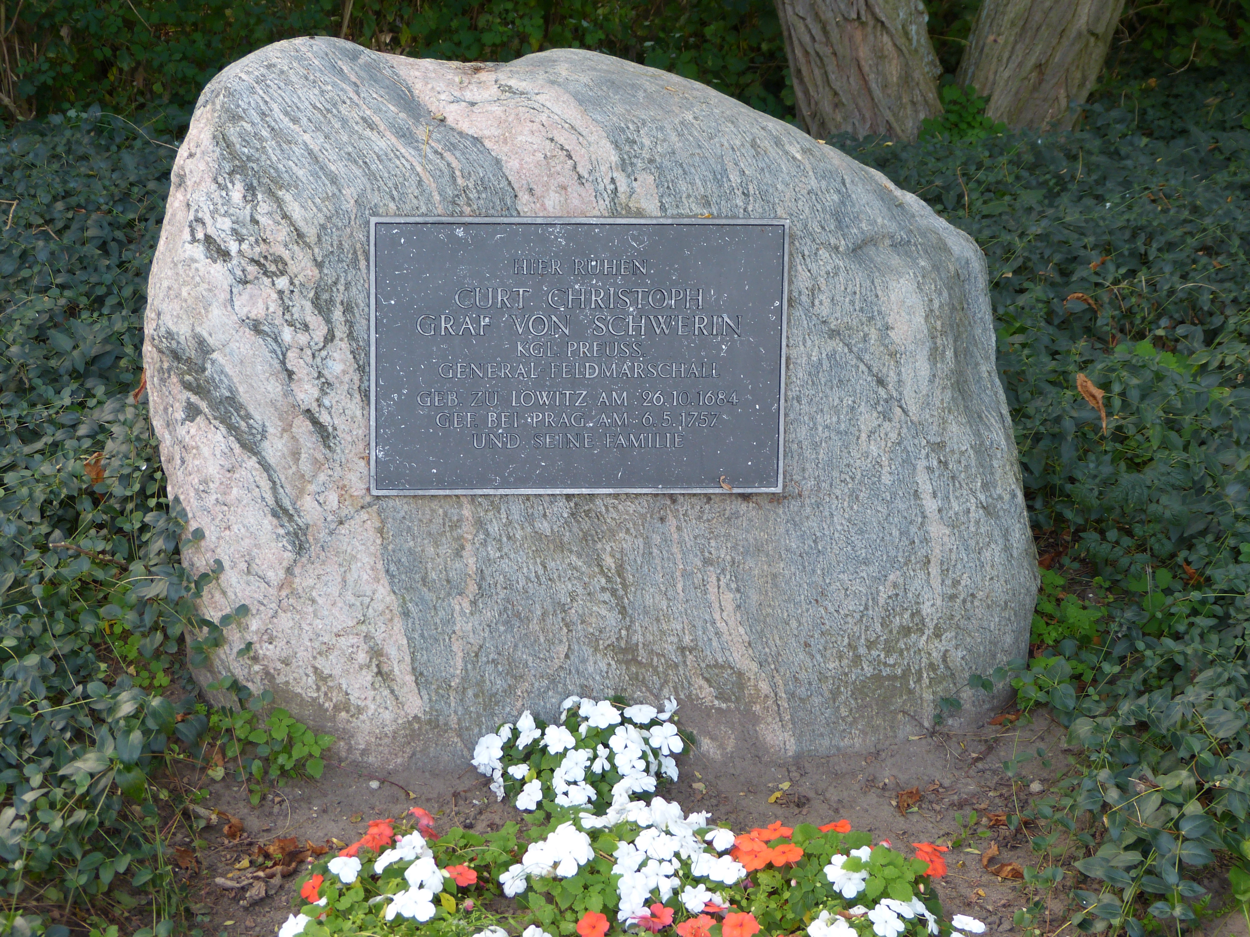 Grabstein für Kurt Christoph von Schwerin und seine Familie auf dem Friedhof in Wusseken